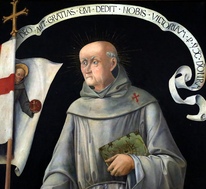 Kapisztrán Szent János festménye, Pannonhalma